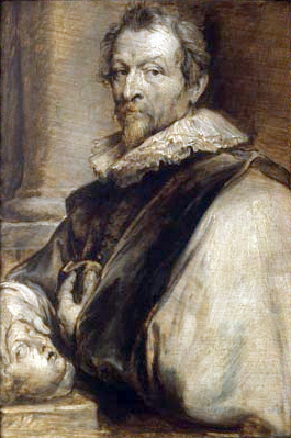 portrait in grisaillemedium QS:P186,Q750197